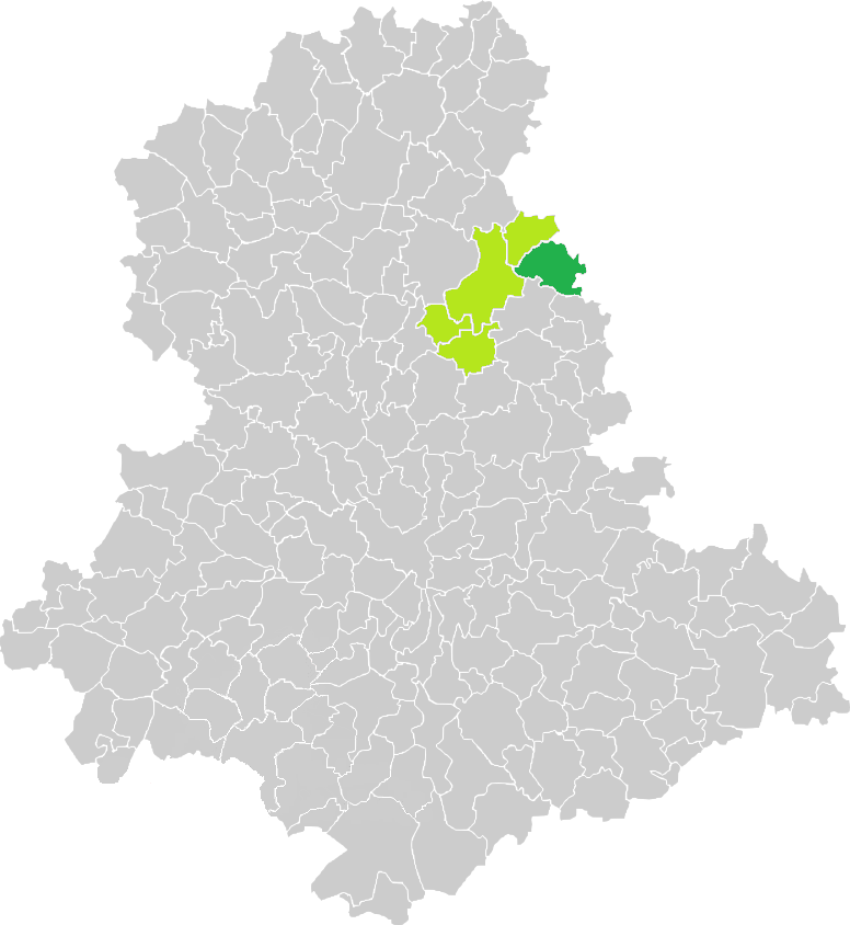 Carte de situation de la commune de Folles (en vert foncé) dans le votre Canton (en vert clair) sur une carte des communes de la Haute-Vienne